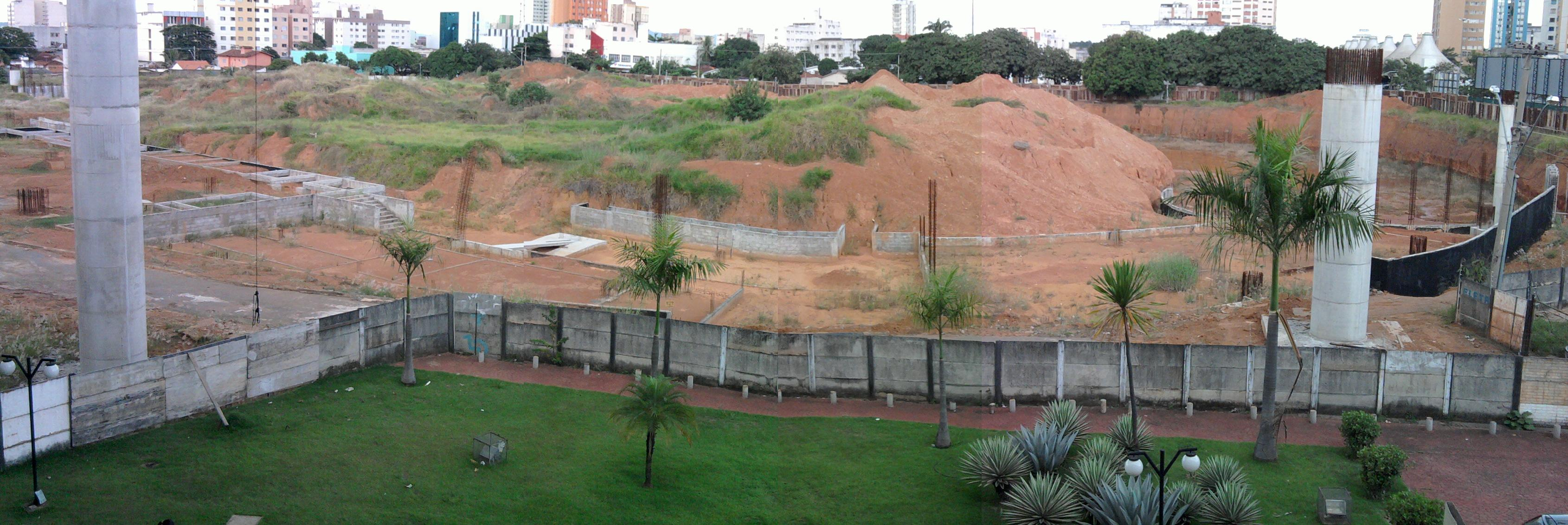 Terreno que abrigava o Estádio Olímpico - Goiânia - Goiás - Brasil